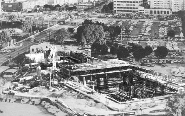 Vista de la construcción de la Torre Carlos Pellegrini, o Torre UIA, del estudio Manteola, Petchersky, Sánchez Gómez, Santos, Solsona, Viñoly, ubicada en el conjunto Catalinas Norte en Buenos Aires, Argentina. Comienzos de la década de 1970.